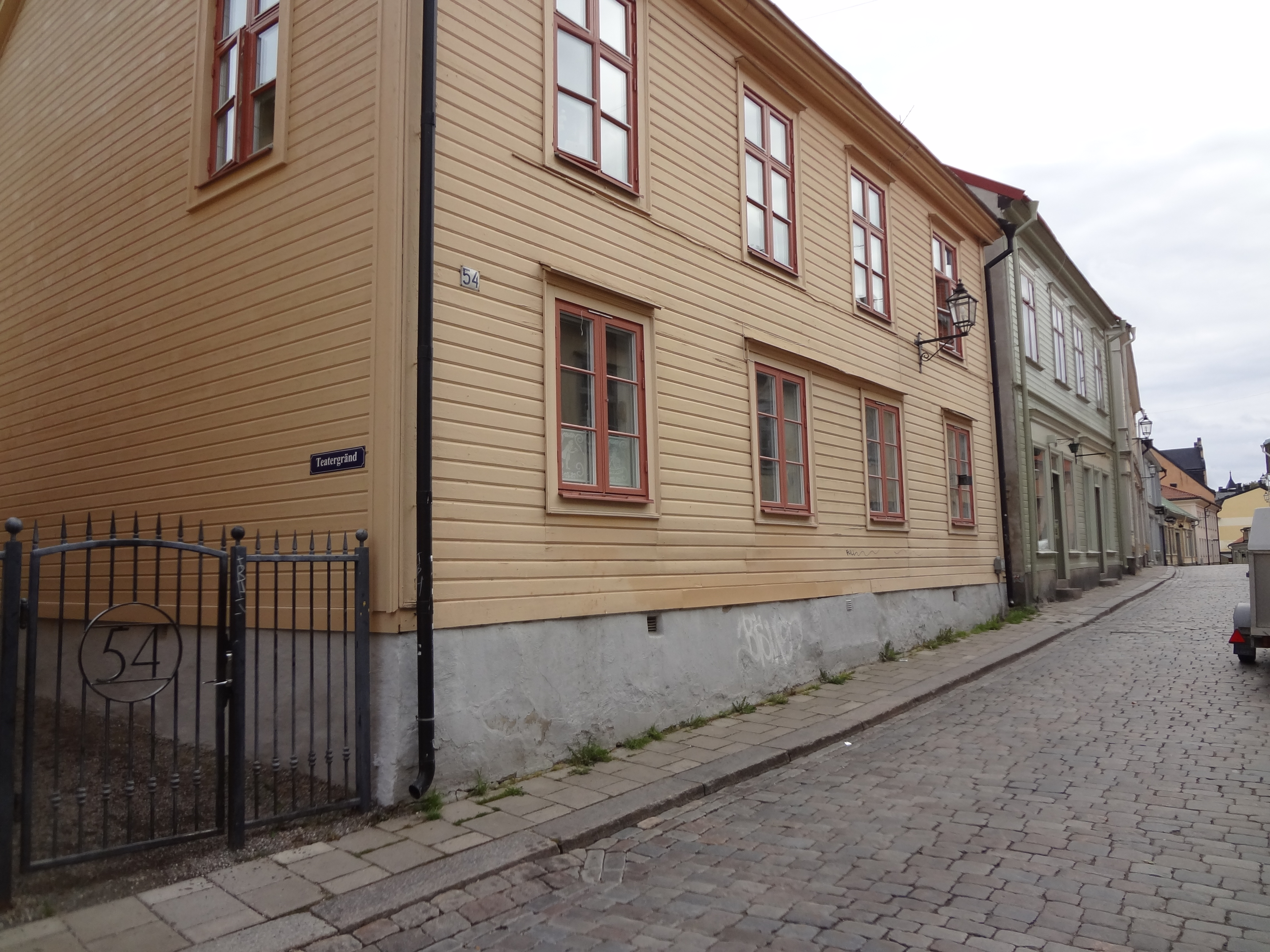 Kvarteret Stövaren 18 (Stövaren 18)